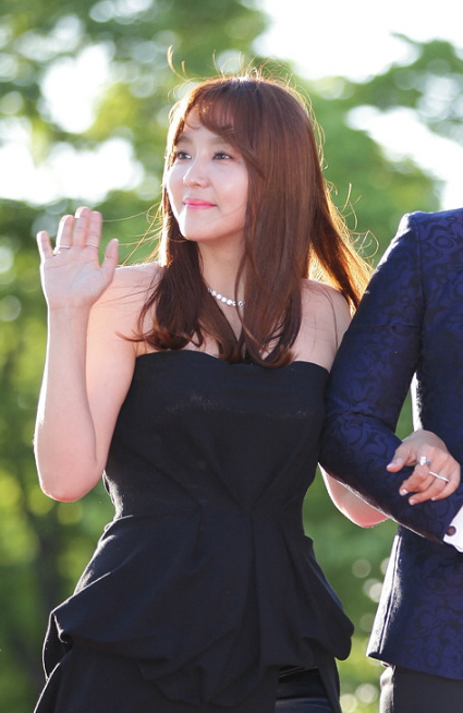 제19회 부천국제판타스틱영화제 개막식 레드카펫 part.2